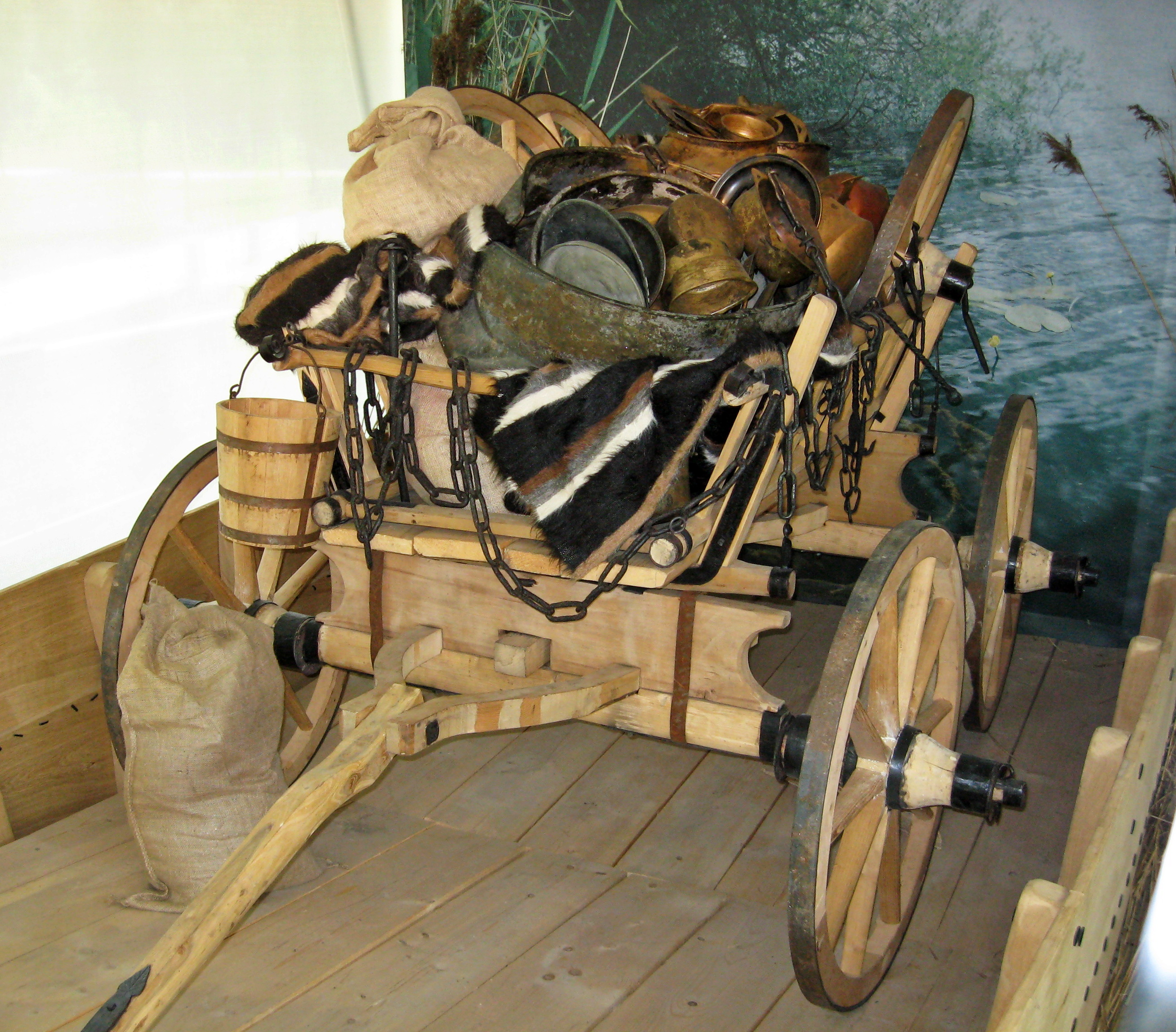 Wagen